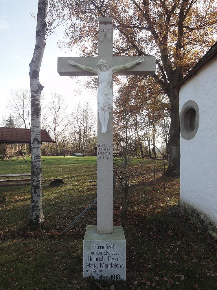 Hochkreuz an der Seppelerkapelle in Verl